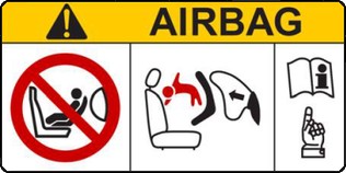 新様式エアバッグ警告ラベル